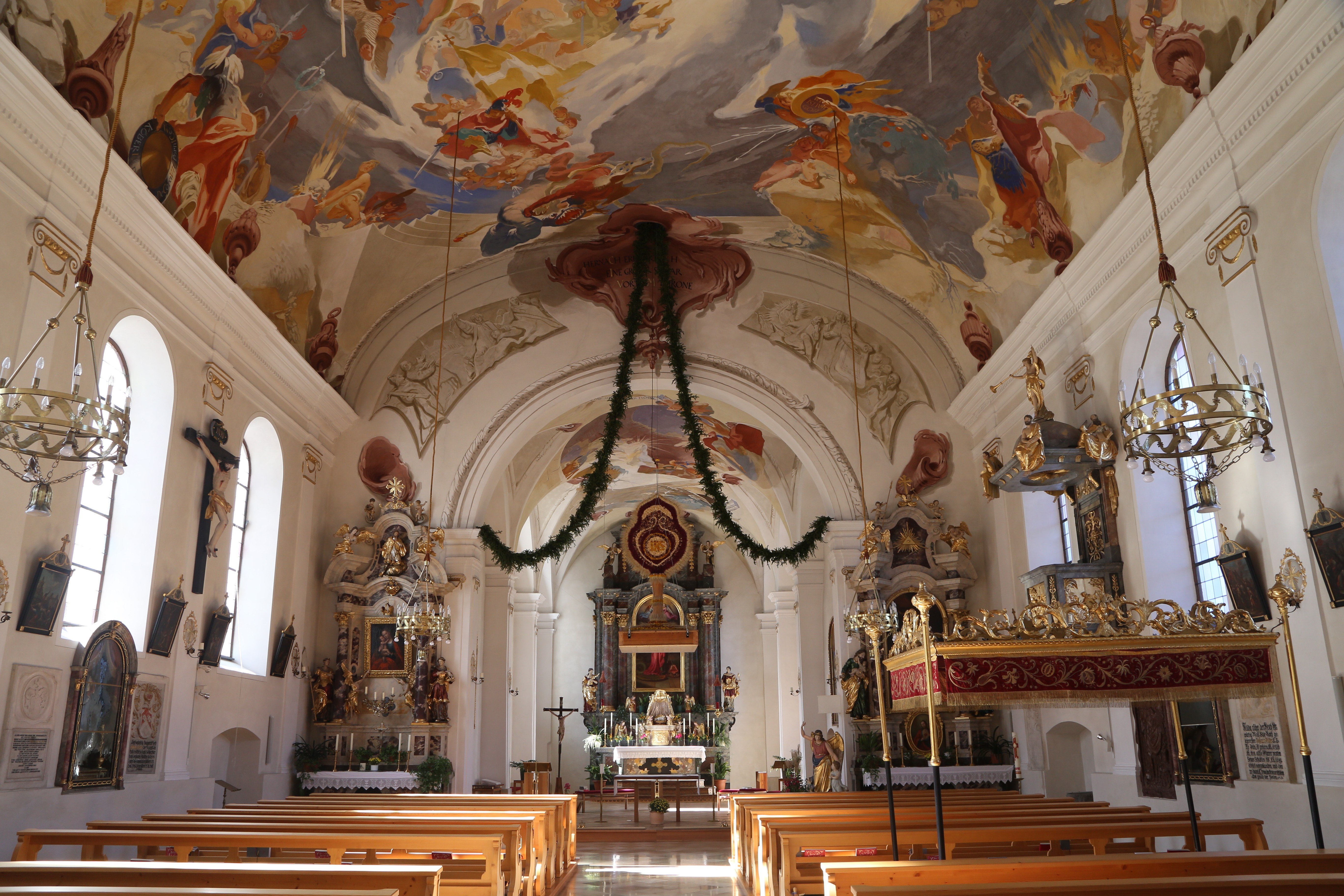 Kath. Pfarrkirche hl. Margareta, Kirchplatz, Flaurling; Urkundlich wurde 1326 die Weihe einer Kapelle genannt. 1508 erfolgte eine Vergrößerung mit dem Baumeister Oswald Klotz. 1578 erfolgte eine Einwölbung und Verzierung mit gotischen Rippen mit Wolfgang Rosenberger der Jüngere. 1750 war ein Umbau. 1836 erfolgte ein Neubau des Langhauses und damit eine neue Ausrichtung der Kirche mit dem Architekten und Bildhauer Josef Falbesoner. Hochaltarblatt hl. Margarethe, gemalt von Caspar Jele (1843) Object location47° 17′ 27.48″ N, 11° 07′ 17.68″ E